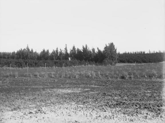 מושב גן חיים 1938 אוסף זולטן קלוגר גנזך המדינה